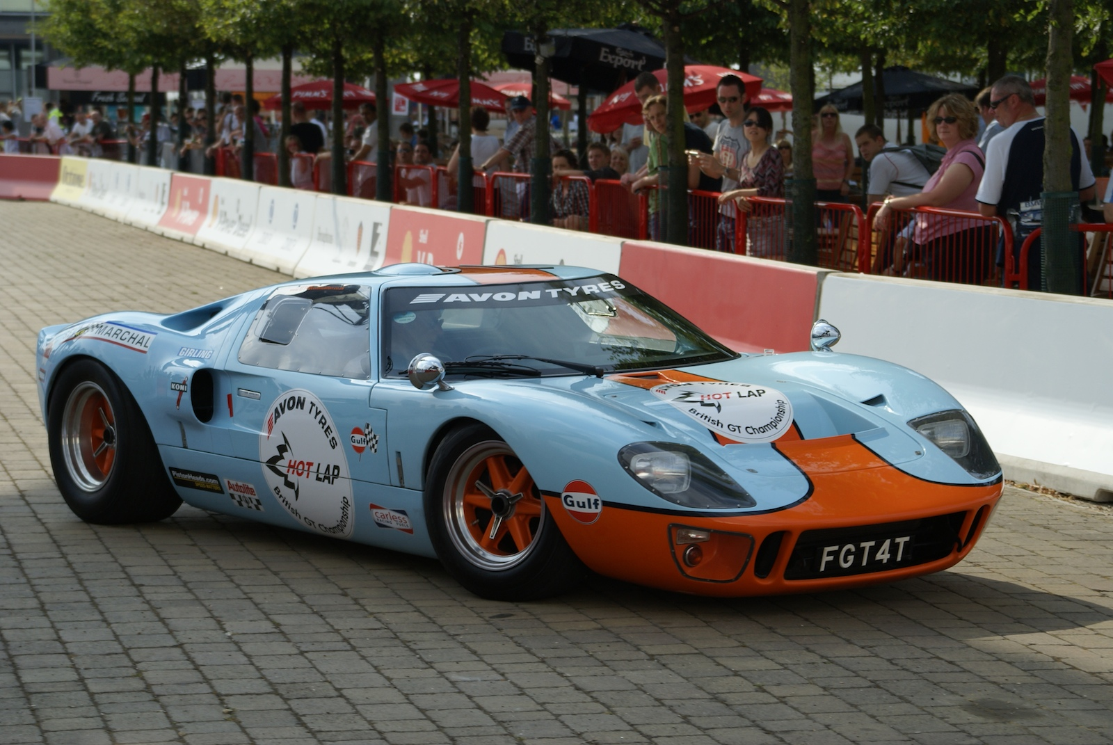 Ford GT